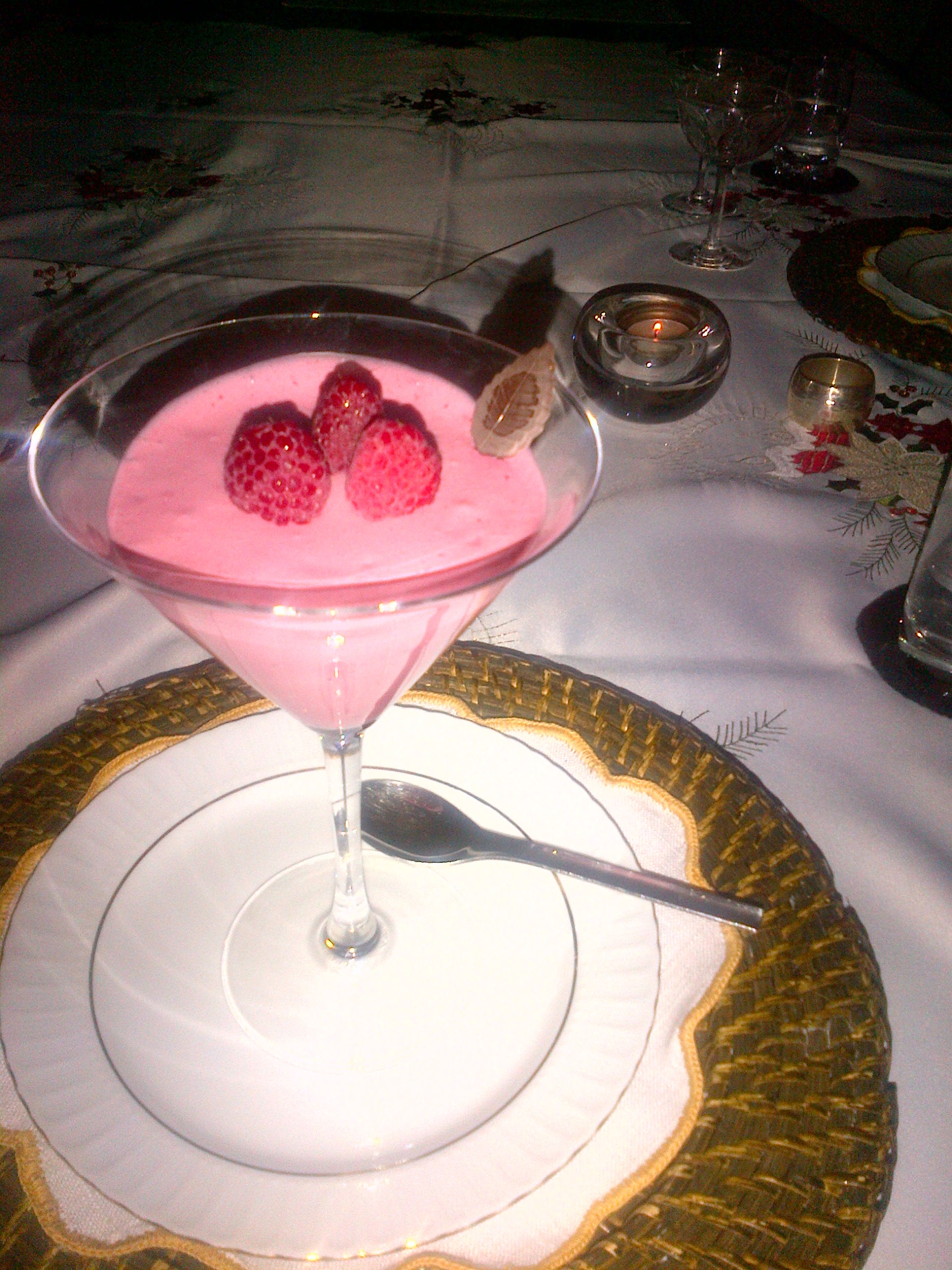 Bavarois de frambuesas, decorado con frambuesas y una hoja de chocolate sabor menta. Made in Turkey.